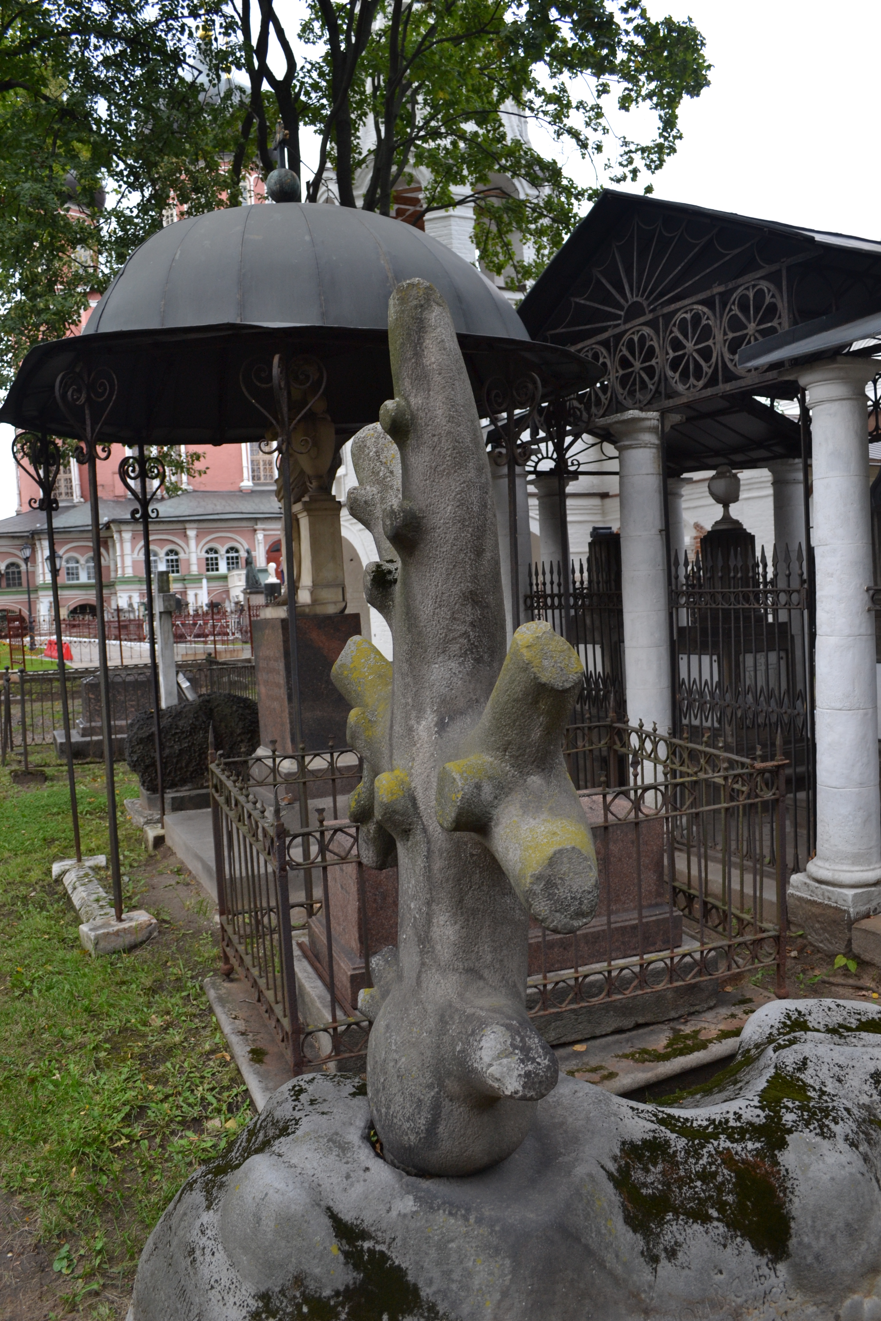 Памятник поручику Баскакову